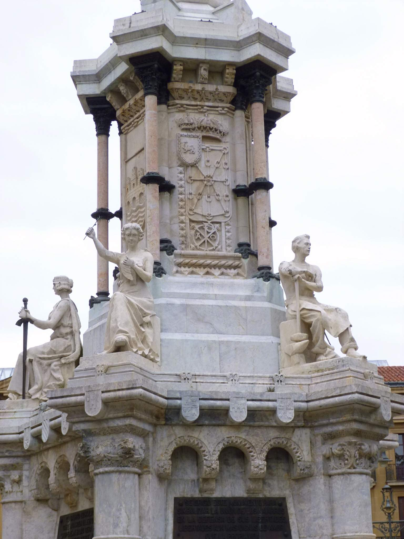 Monumento a los Fueros (Pamplona)